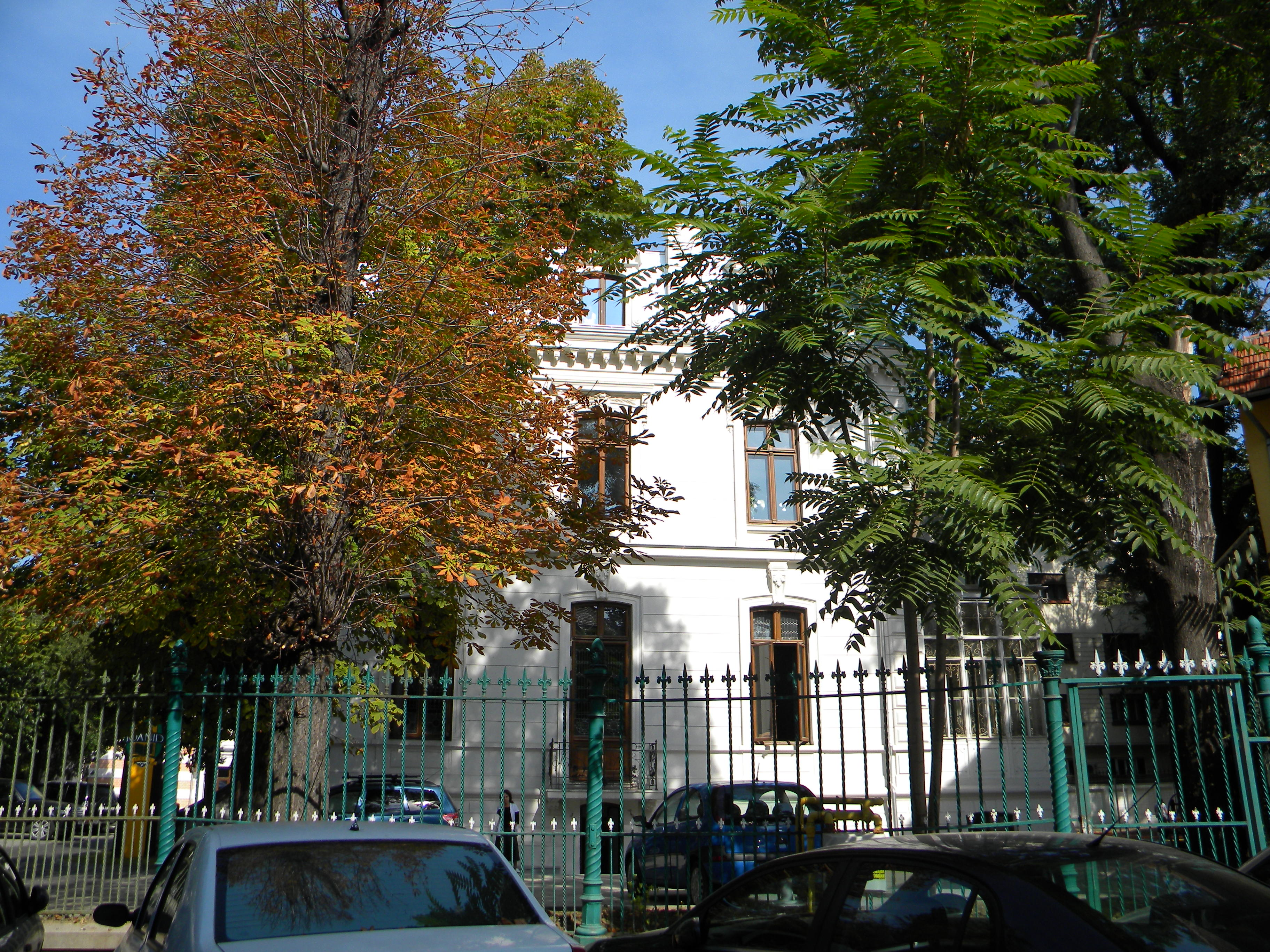 Bucuresti, Romania, Casa g-ral Arion (azi Scoala Ioanid) pe Str. Nicolae Iorga nr. 21, sect. 1 (1)